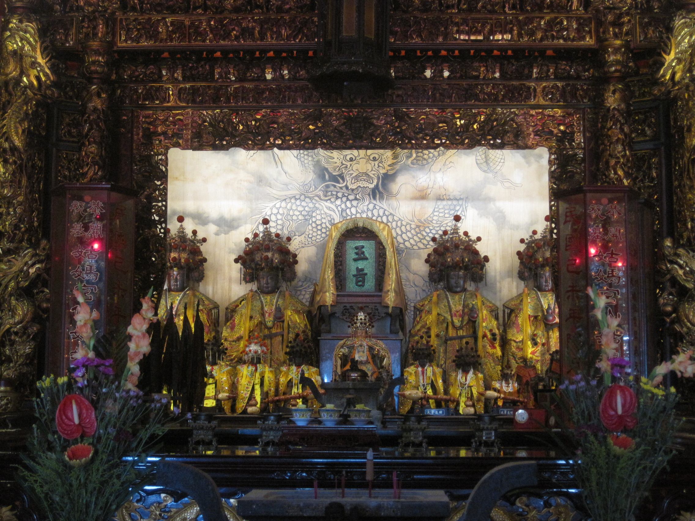 八份姑媽宮仙姑娘媽